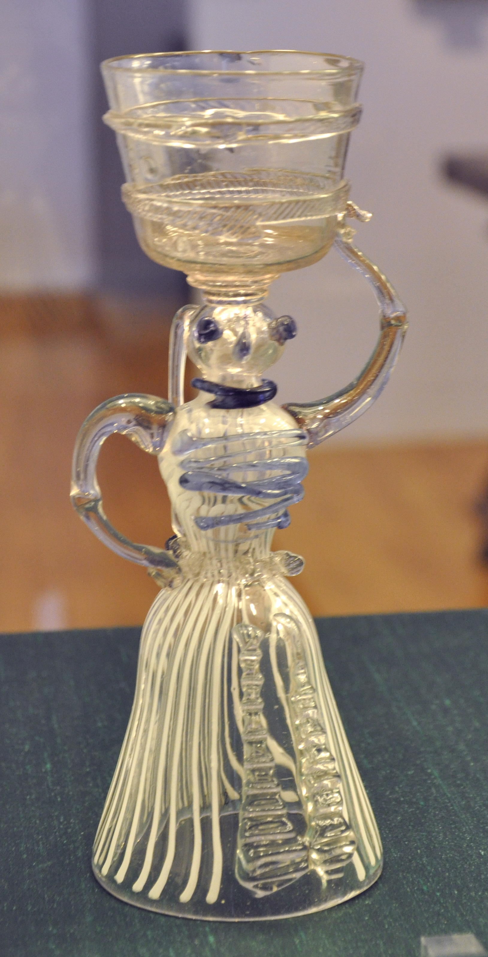 Scherzgefäss „Jungfrauenbecher“, Deutschland 17./18. Jh., farbloses Glas mit weißen Emailfarben Museum für Angewandte Kunst, Frankfurt, Inv. Nr. 6782